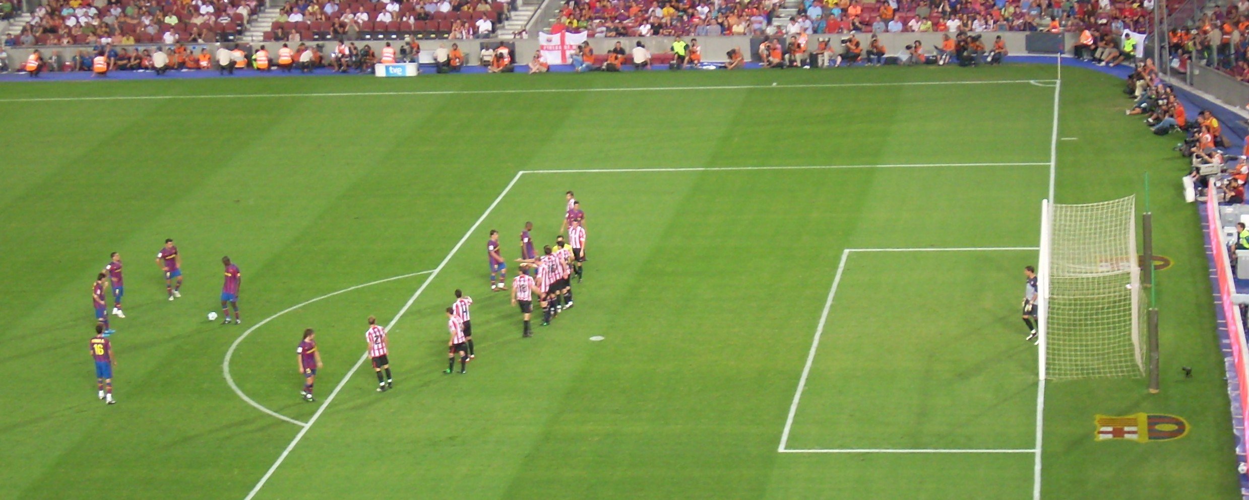 Instante de la segunda mitad del partido de vuelta de la Supercopa de España 2009 celebrado entre el Athletic de Bilbao y el FC Barcelona.